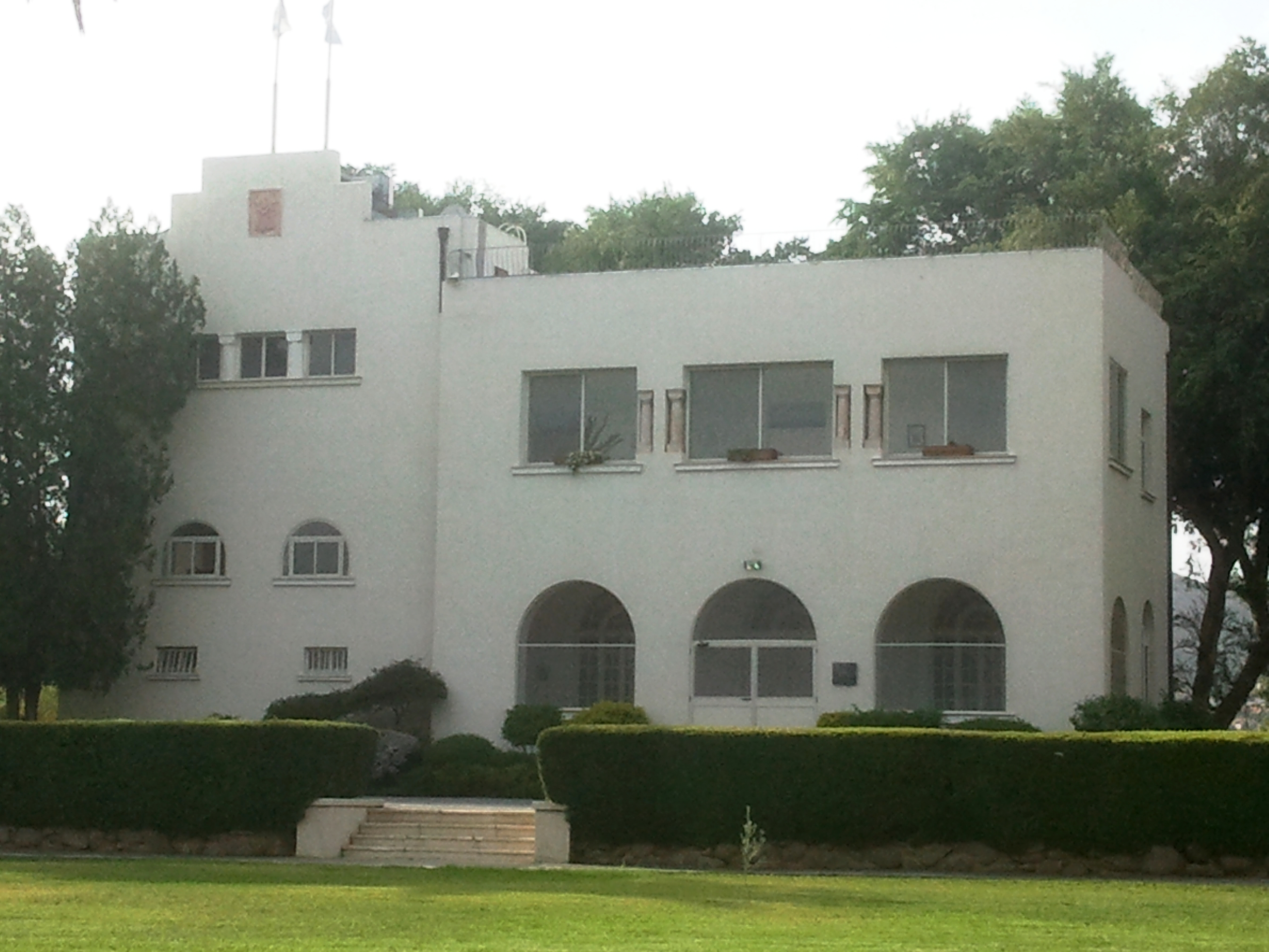 וילה מלצ'ט שוכנת על שפת הכנרת, מול המושבה מגדל, הבית החל להיבנות . בשנת 1928 כבית אירוח של לורד מלצ'ט, במשך השנים הוזנח הבית, בשנות ה-70 של המאה העשרים נרכש על ידי משפחת אייזנבג